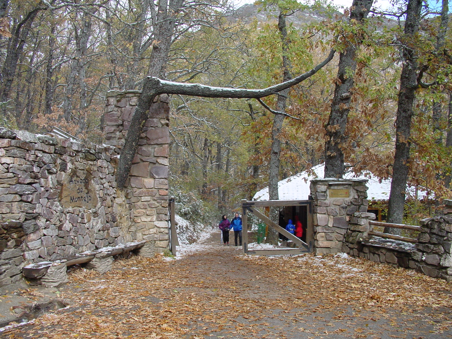 Hayedo en Montejo de la Sierra.